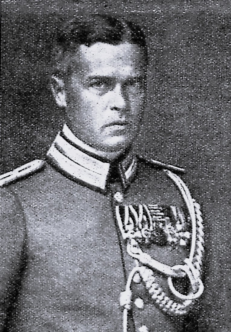 In Garua verstarb am 3. April 1915 der Hauptmann Willy Thiel in der Schutztruppe Kamerun.